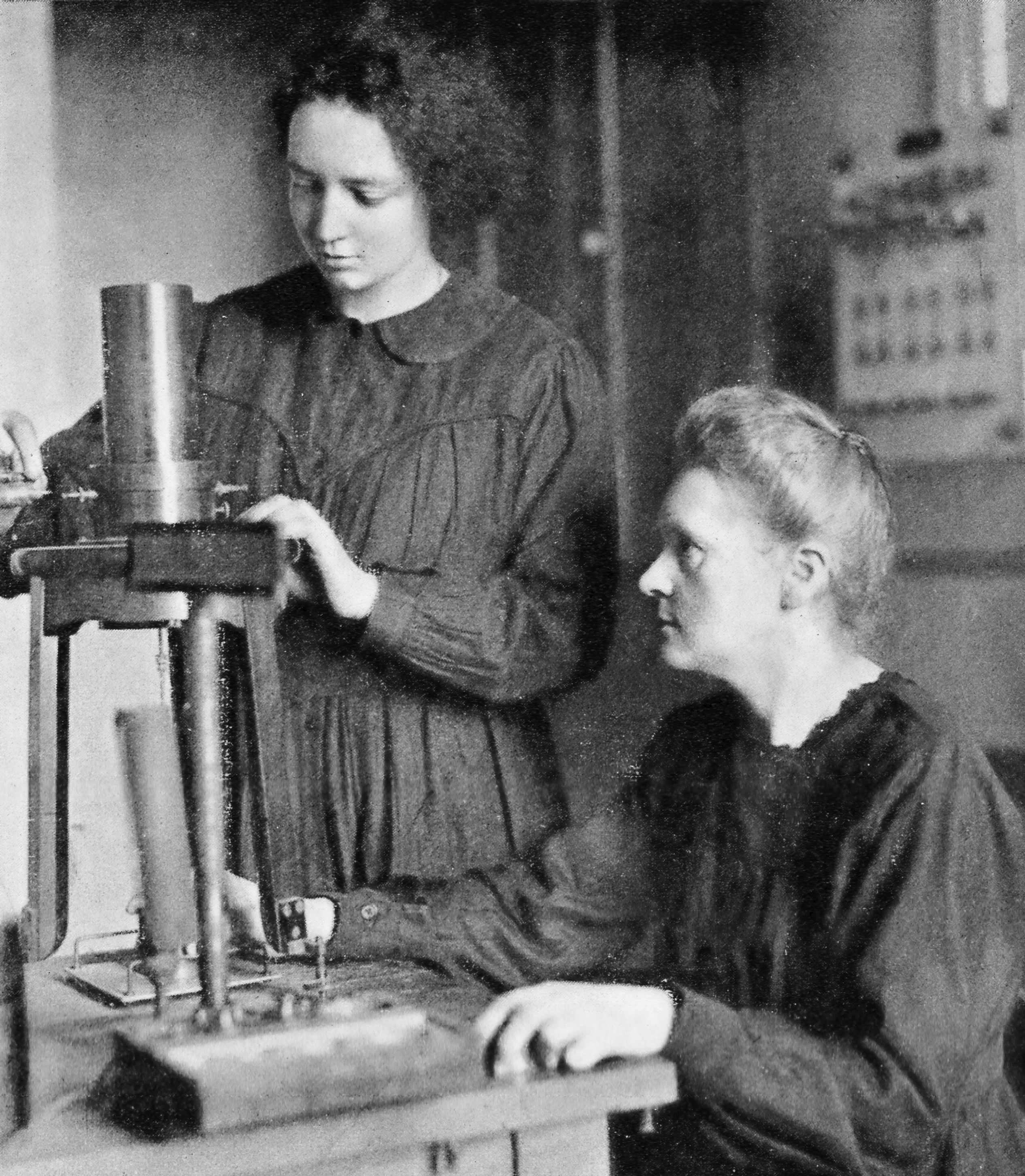 Marie Curie and her daughter, Irene